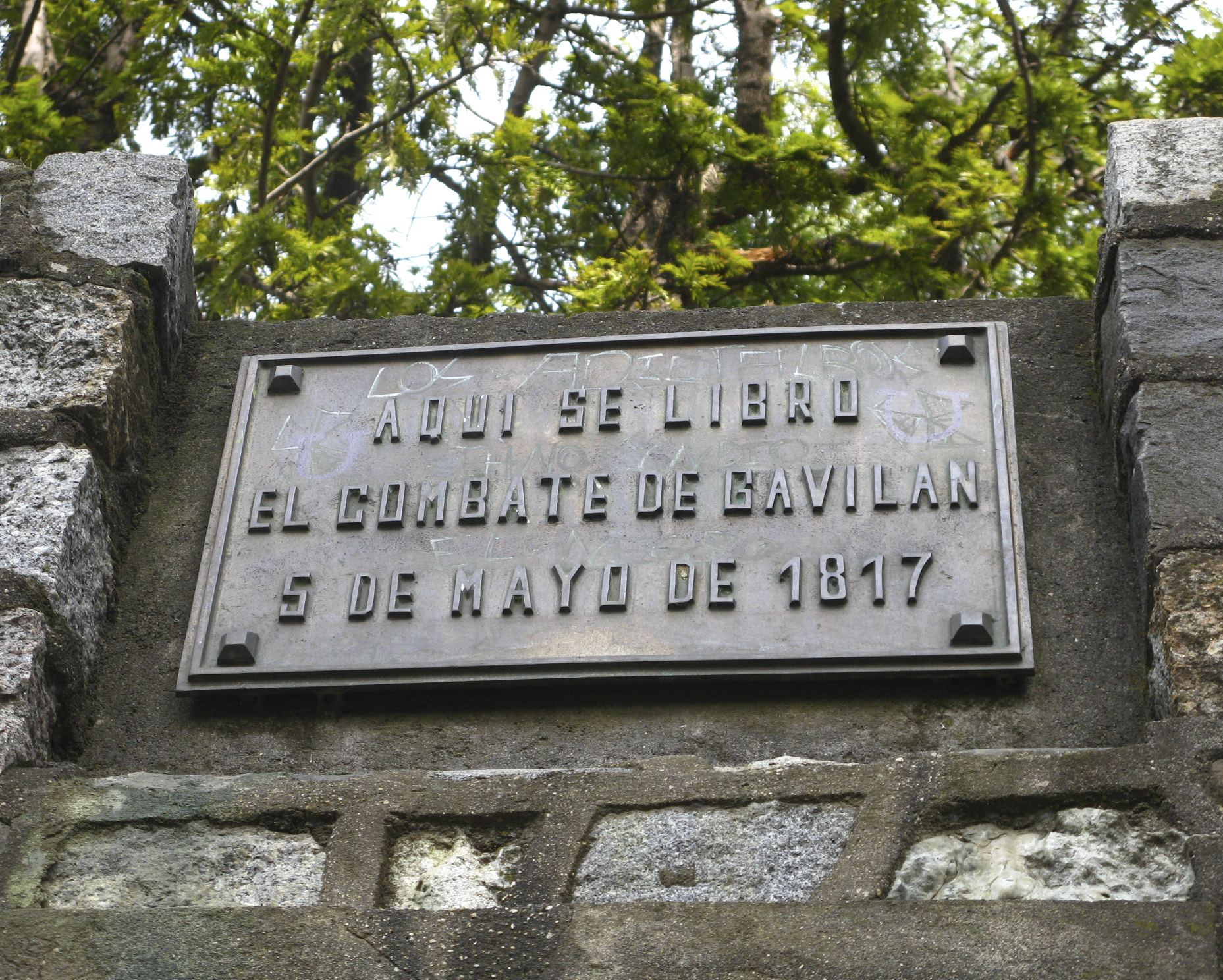 Placa del Combate de Gavilán el 5 de mayo de 1817 Cerro Amarillo, Concepción, Chile Agosto de 2012